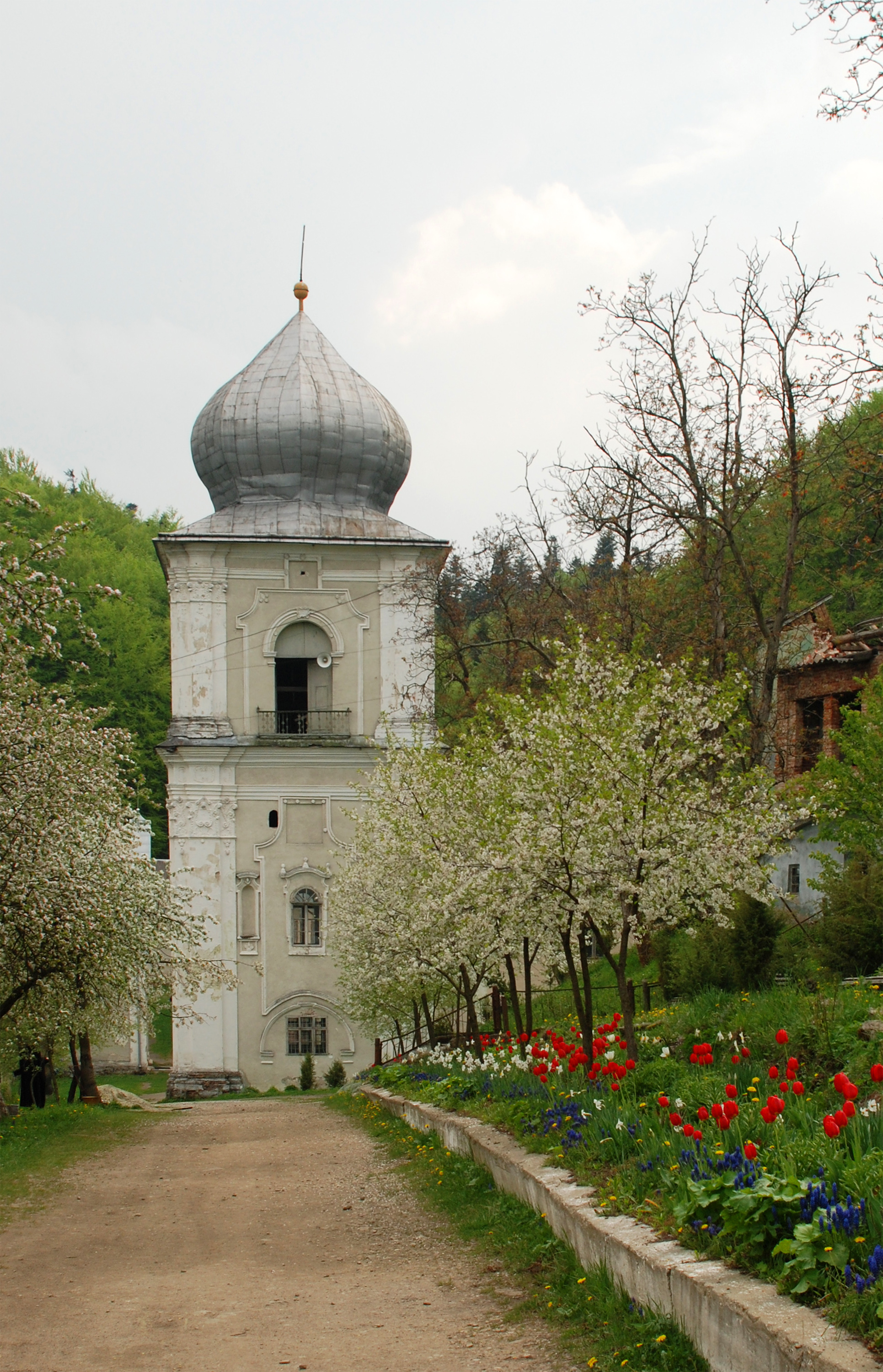 Дзвіниця Василіянського монастиря (мур.), Добромиль, вул. Замкова